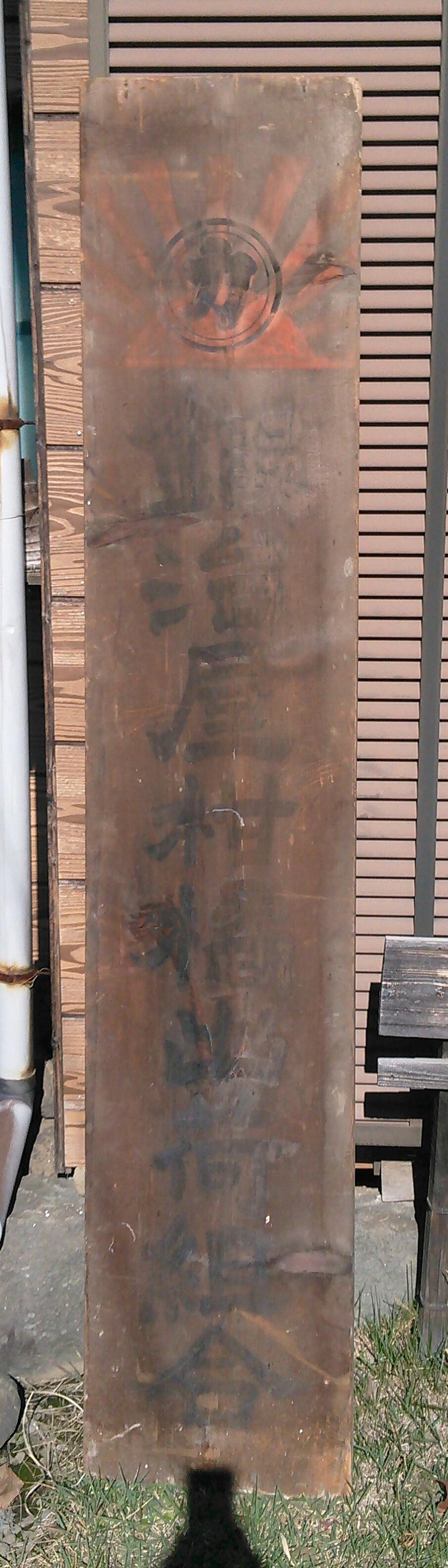 常盤利正氏 蔵